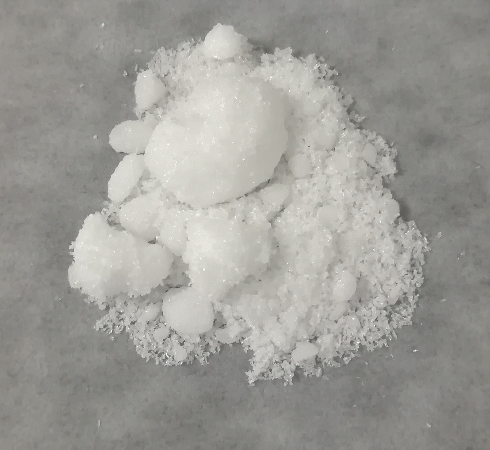 中文（中国大陆）: 四水合溴化镉，纯度≥98%